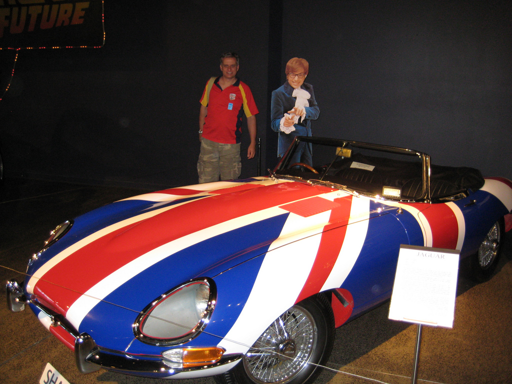 Carro usado por Austin Powers no filme Austin Powers in Goldmember.